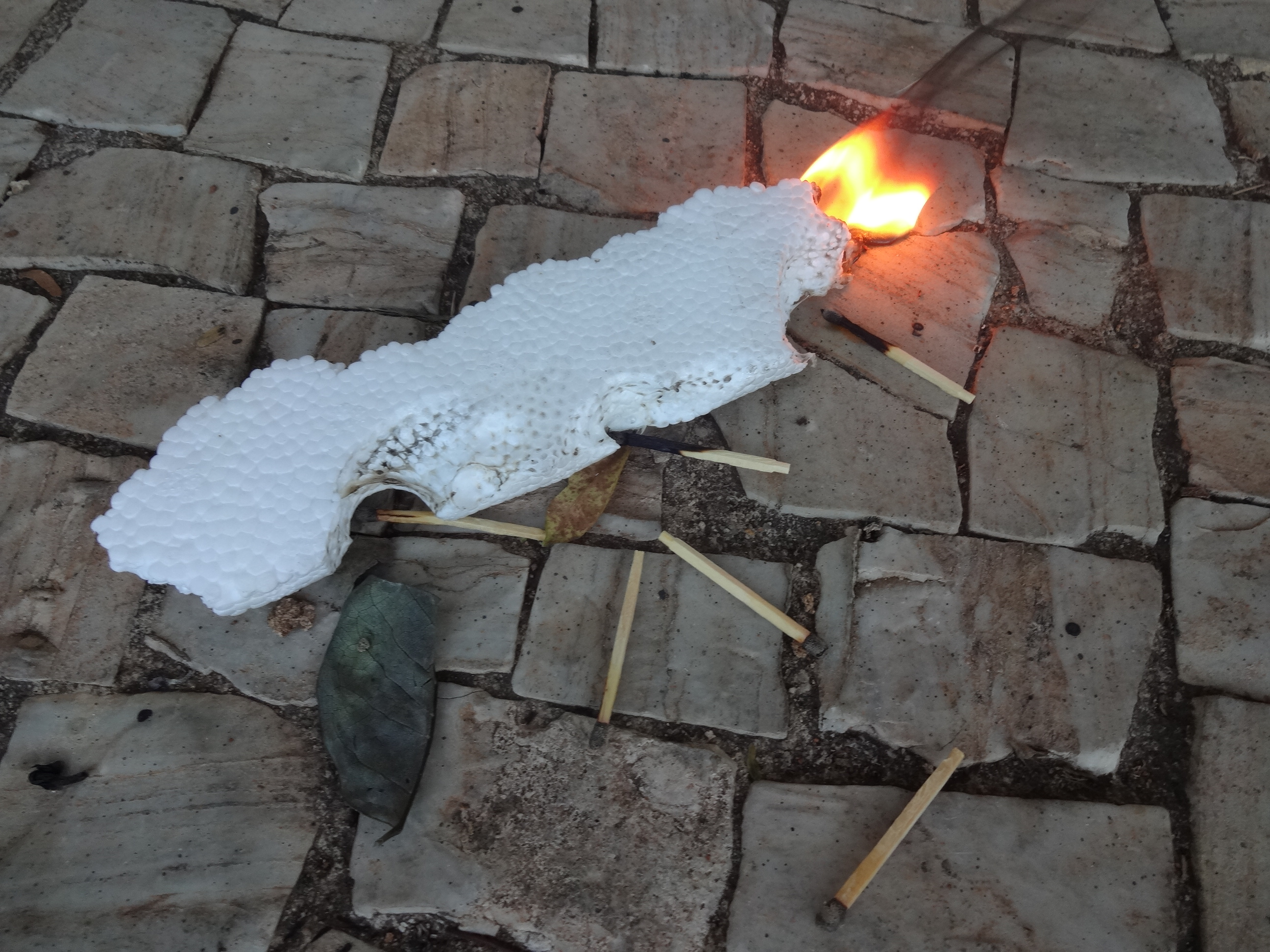 Fogo em poliestireno.